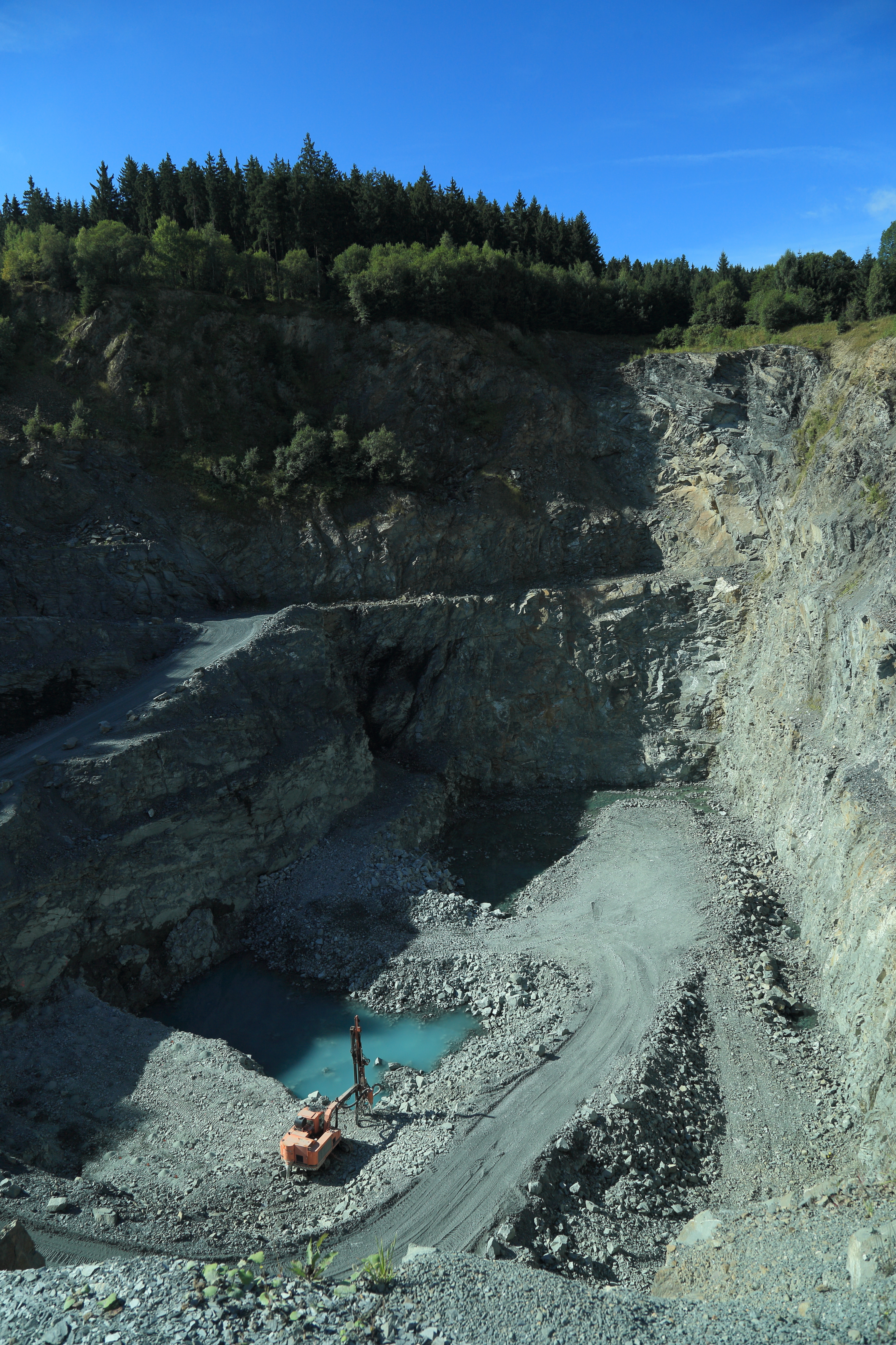 Diabasbruch SE von Ottendorf 476A038